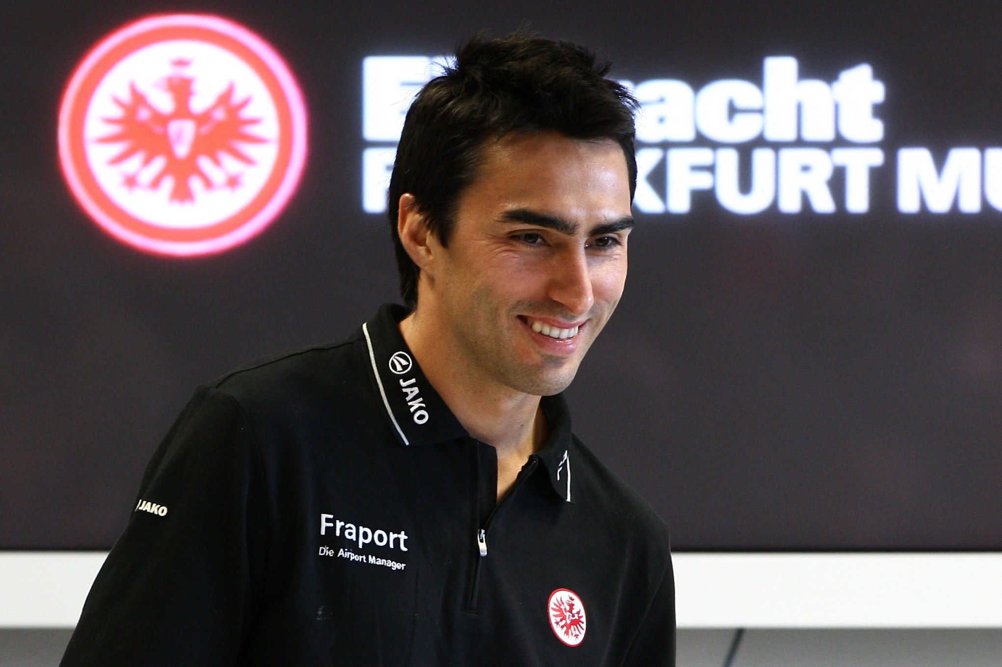 Chris bei der Kinderpressekonferenz im Eintracht Frankfurt Museum 2010